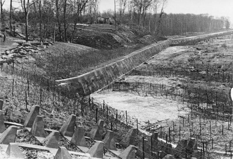 Tankhinderniß im Verlauf des Westwalls. Das Zusammenwirken der Höckerlinie, der Drahthinderniße und der steilen Betonwand macht feindlichen Panzerwagen einen Einbruch unmöglich. Bienwald. 15.4.1940